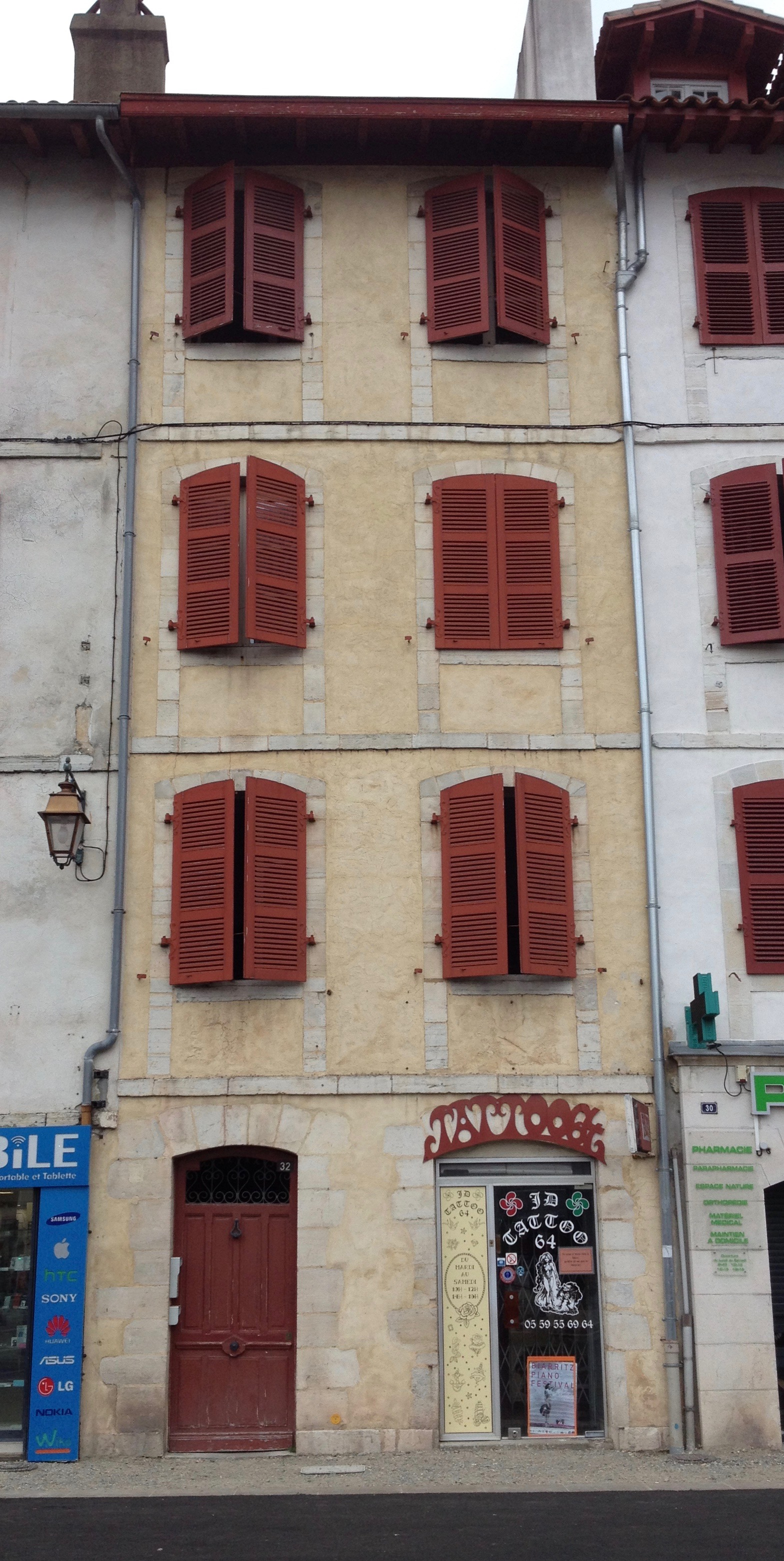 Dans ce bâtiment se trouve l'ancien Mikve de Bayonne (bains rituels juifs).